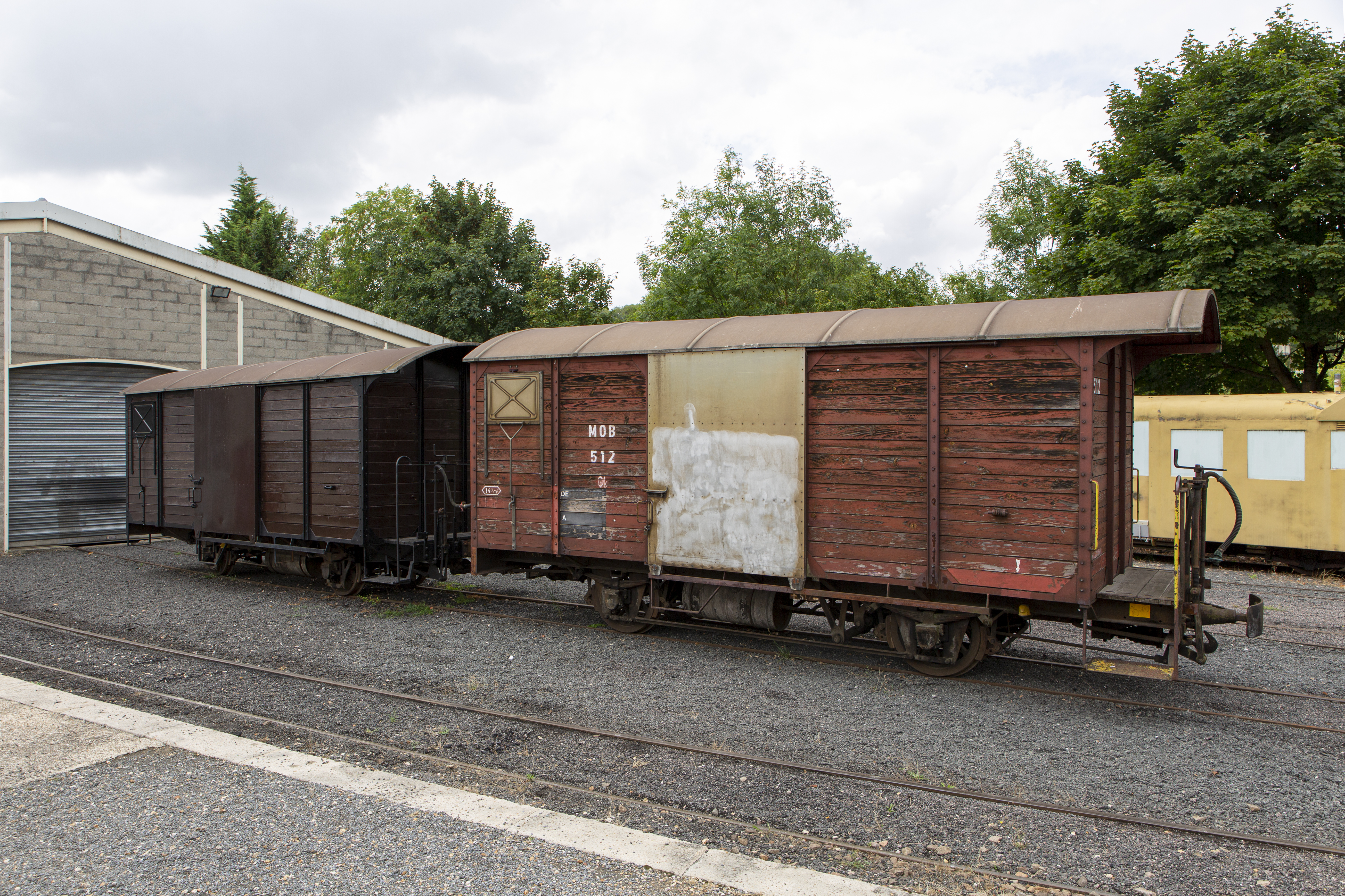 Wagons du MTVS